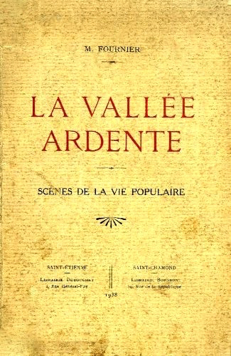 La Vallée ardente, Mathieu Fournier, 1938. IL s'agit de la vallée du Gier (Loire).